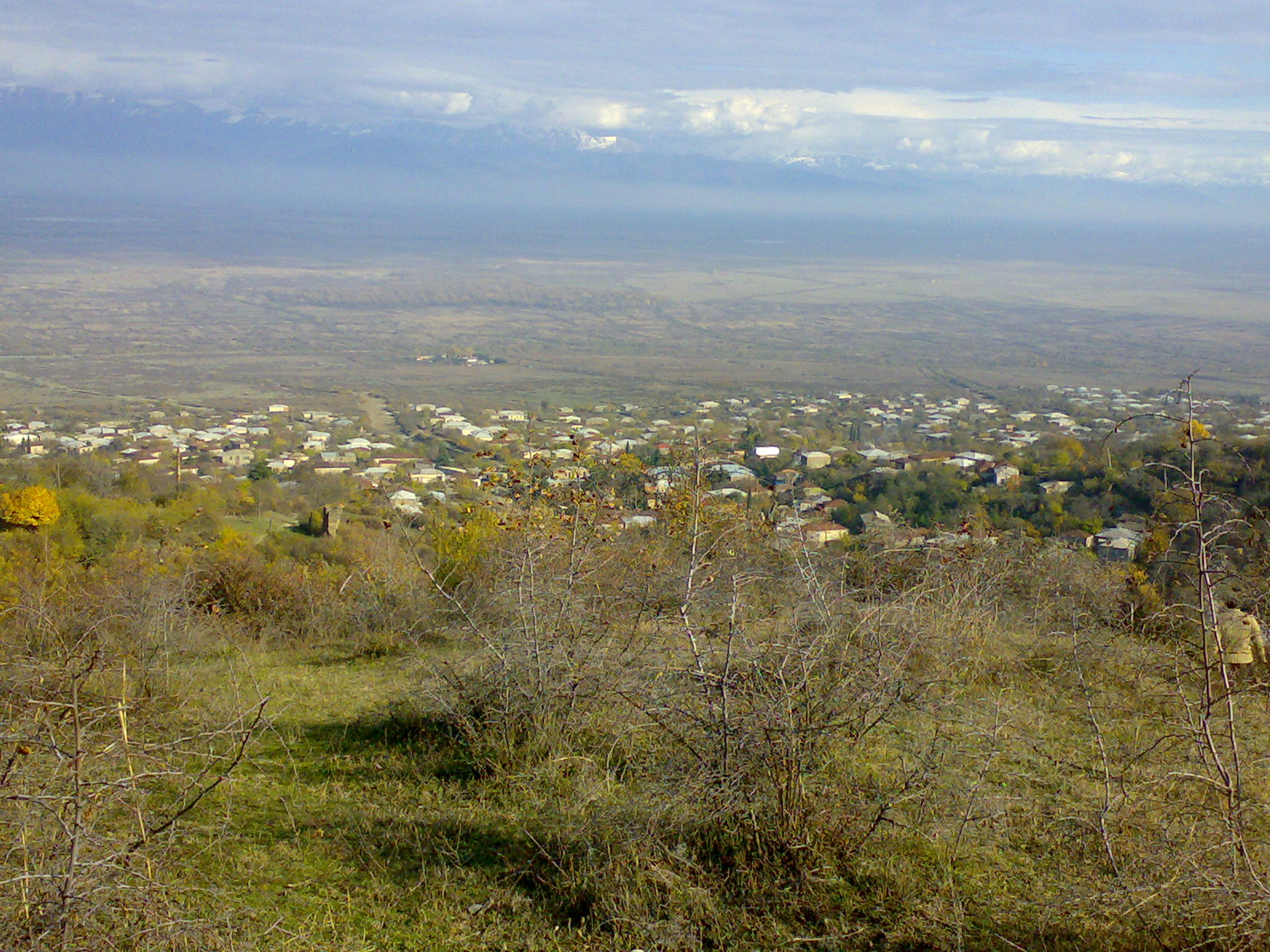 ანაგა